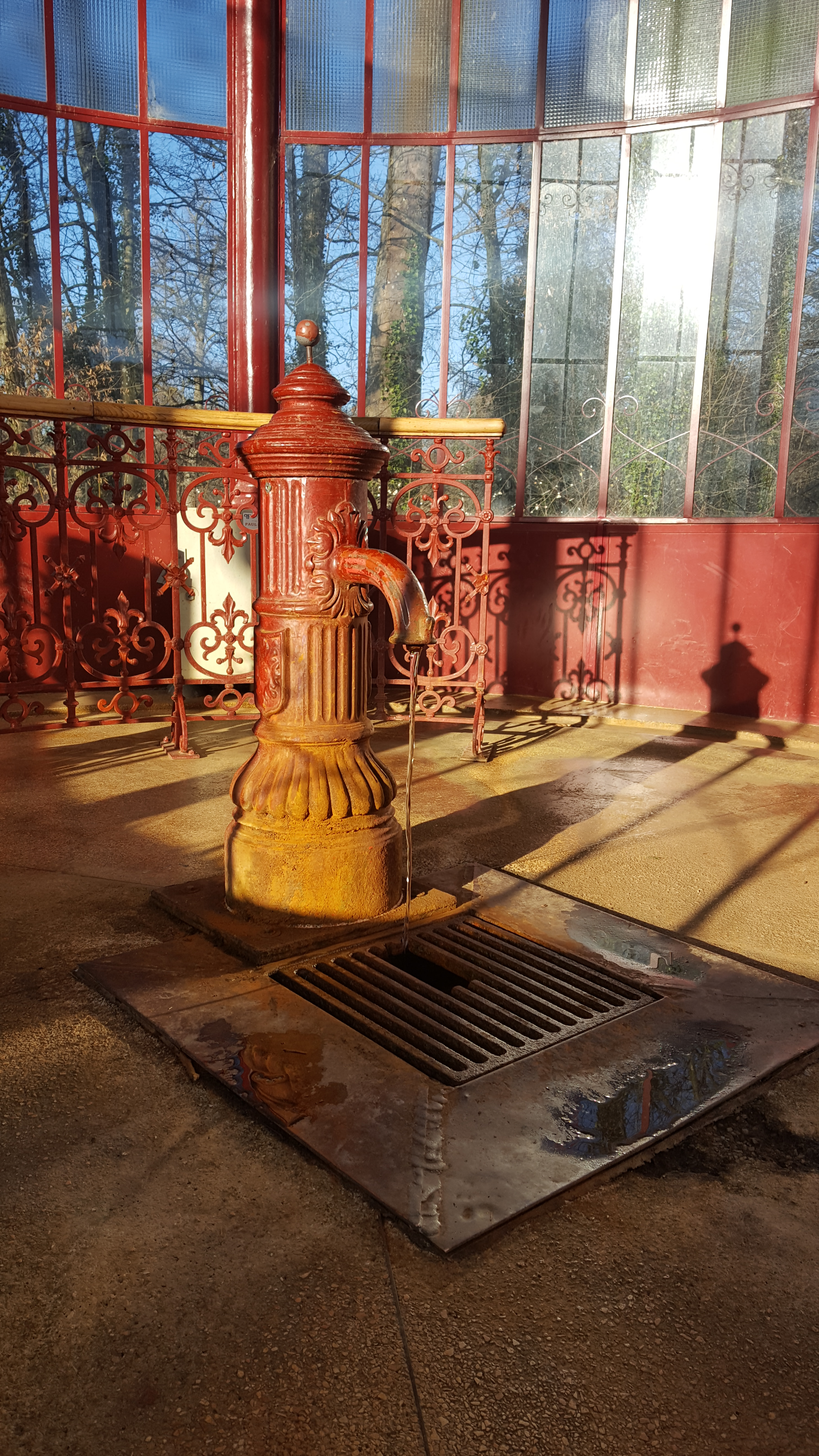 Source du Tonnelet, Nivezé, Spa, Belgique